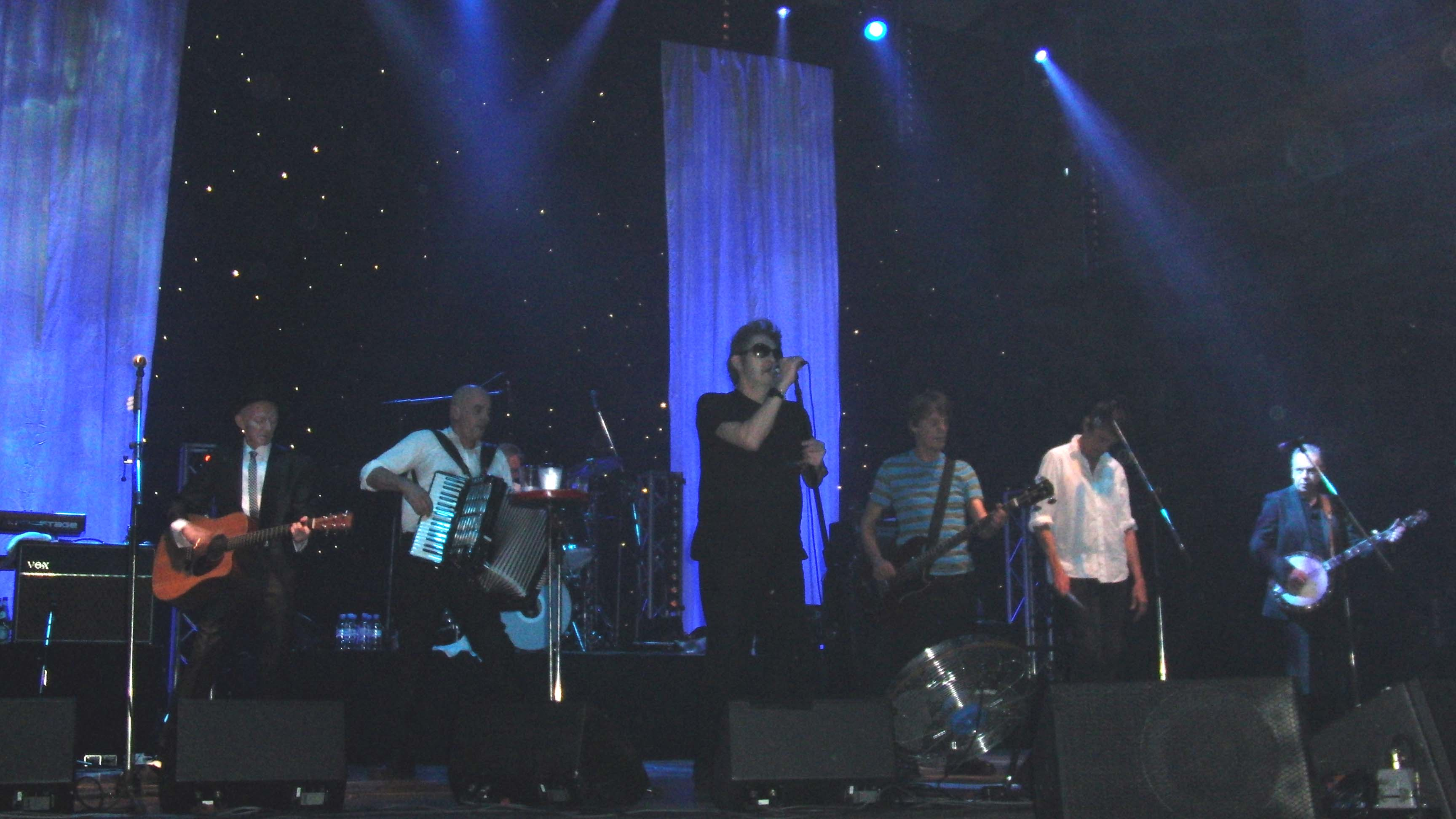 The Pogues in München am 06.07.2011